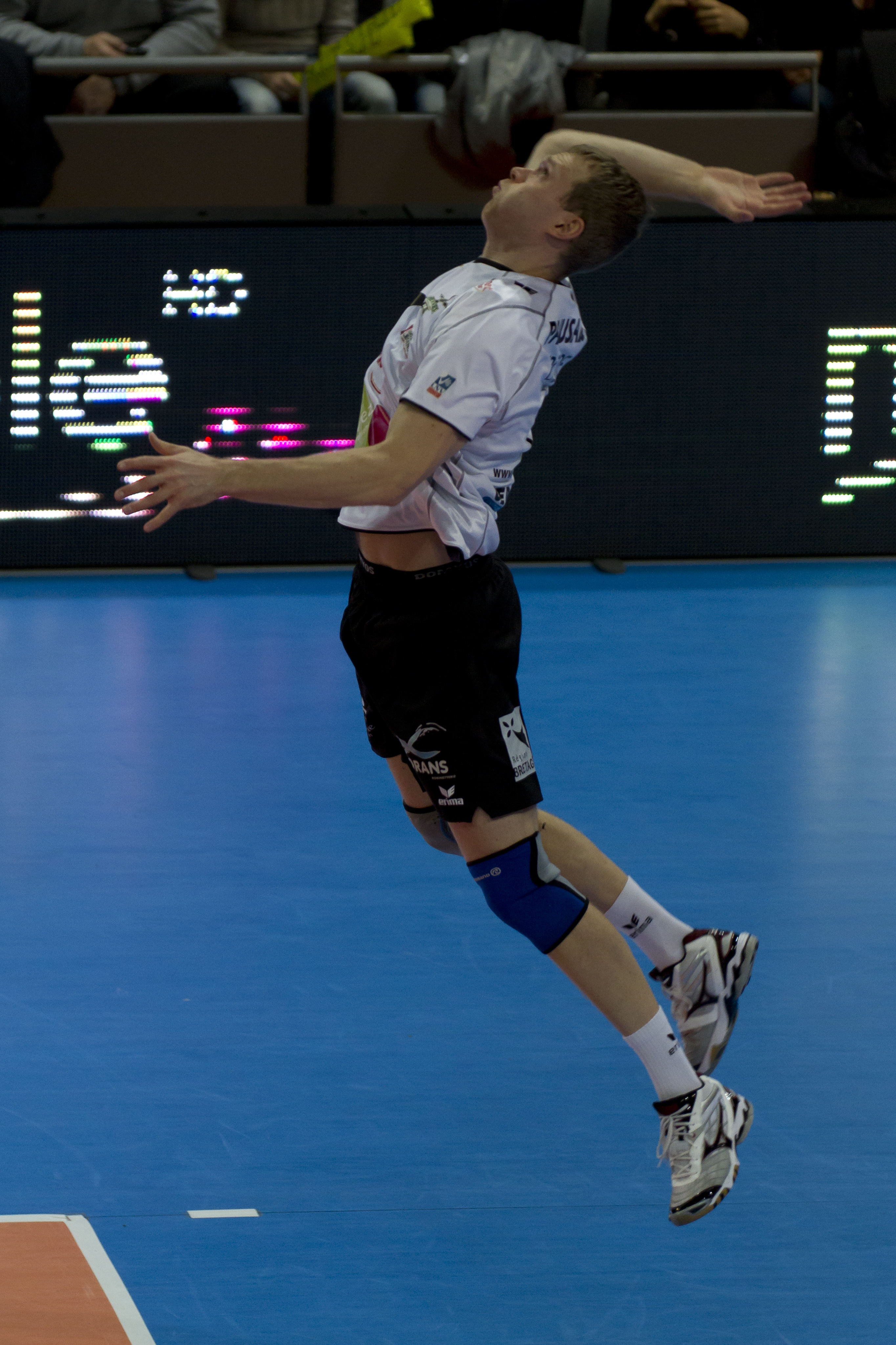 Volleybally - Ligue A - Rencontre du 20 mars 2012 entre les Spacer's de Toulouse et Rennes (3-1) : Raimo Pajusalu (Rennes Volley 35) au service.